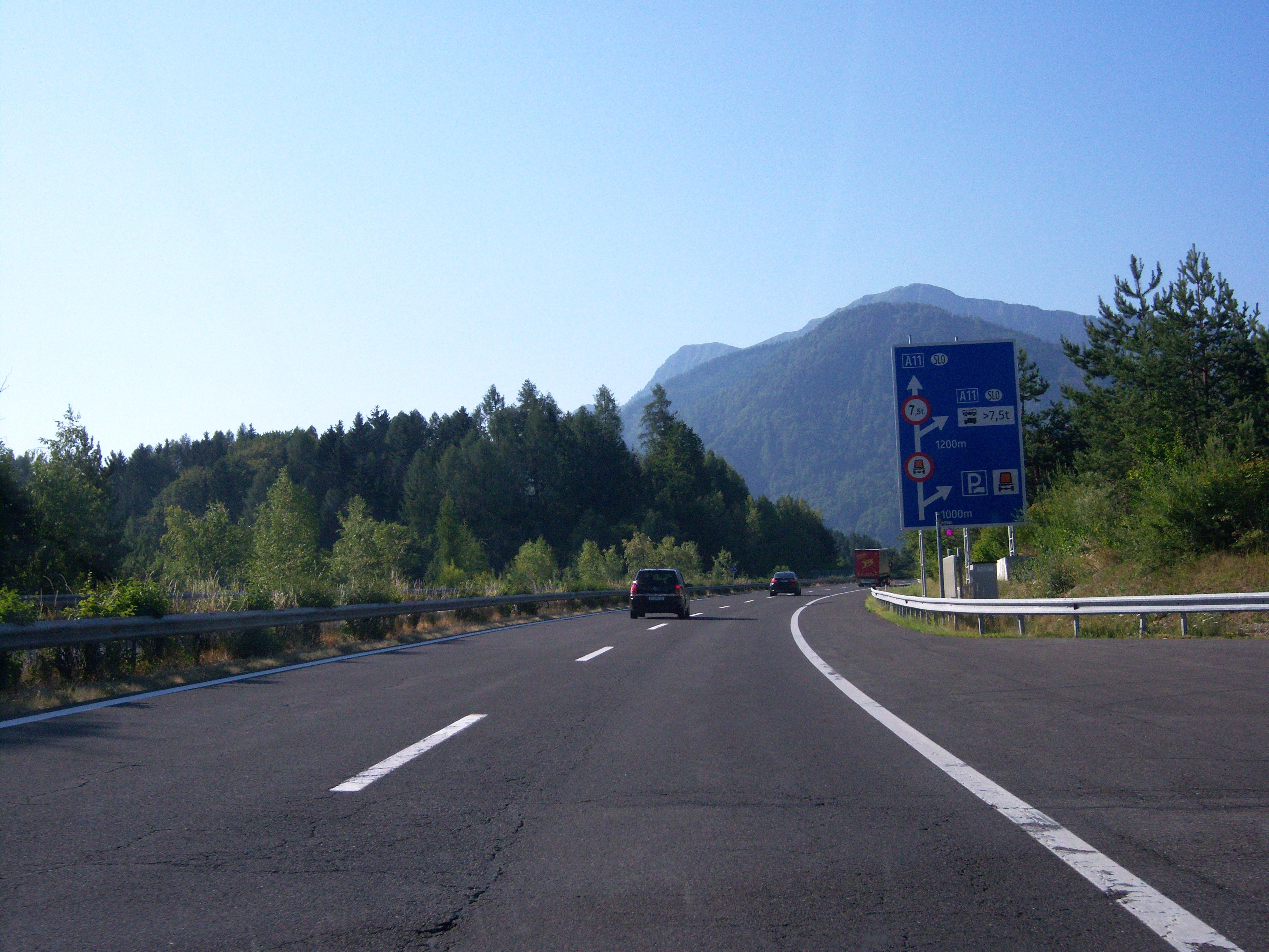 Karawanken Autobahn A11 Richtung Ljubljana vor dem Nordportal des Karawankentunnel